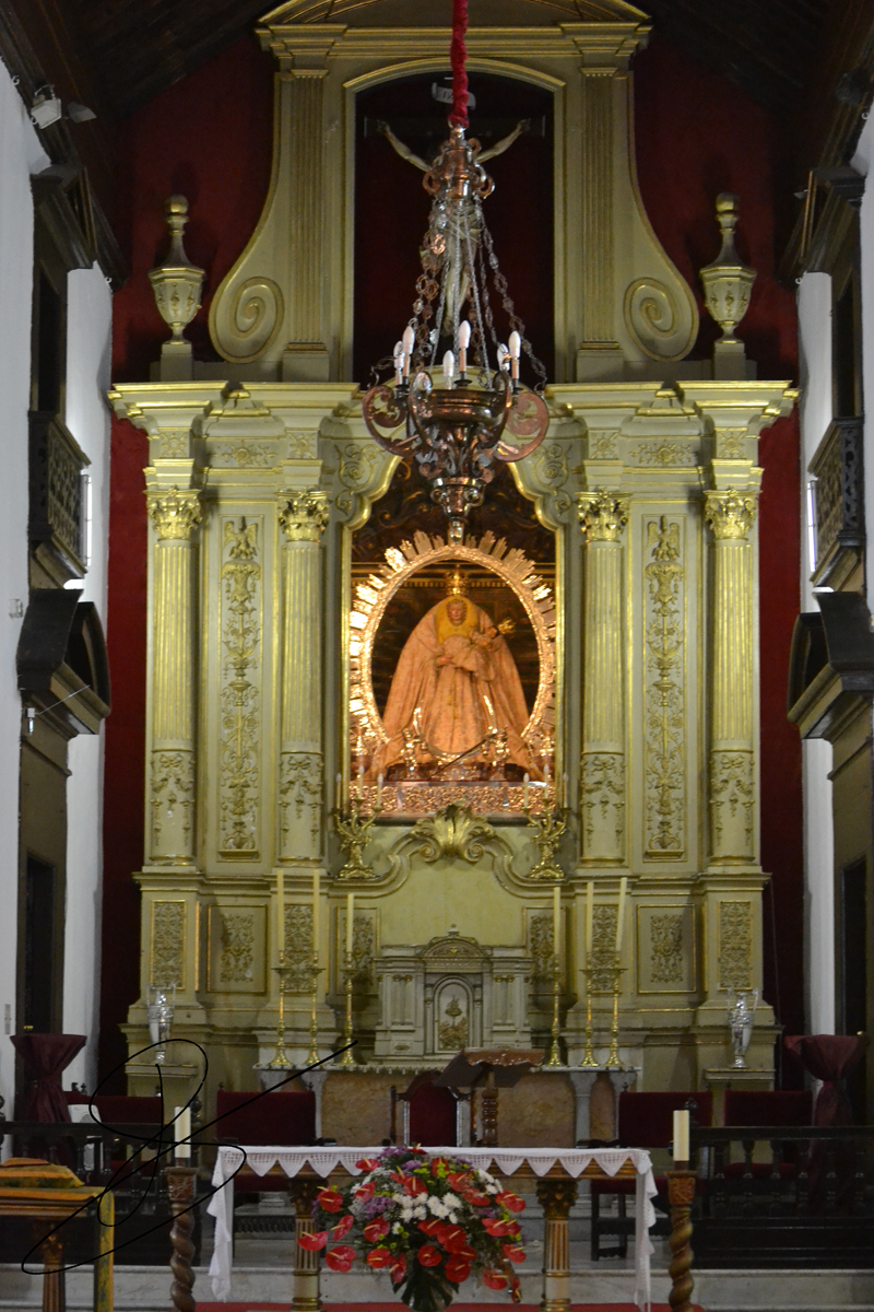 Retablo de Nuestra Señora de Guía